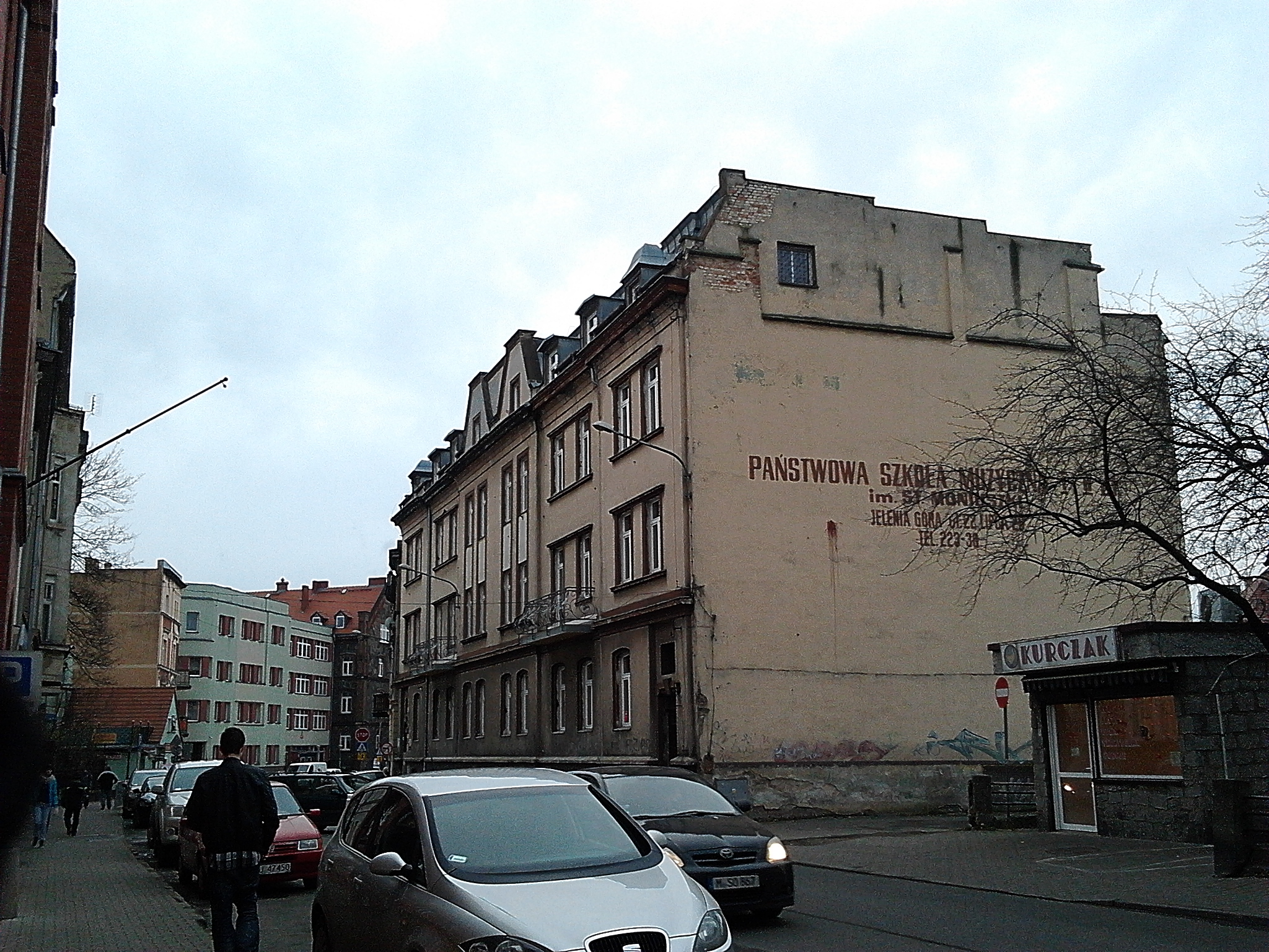 Państwowa Szkoła Muzyczna I i II stopnia, Jelenia Góra, ul. Piłsudskiego 26